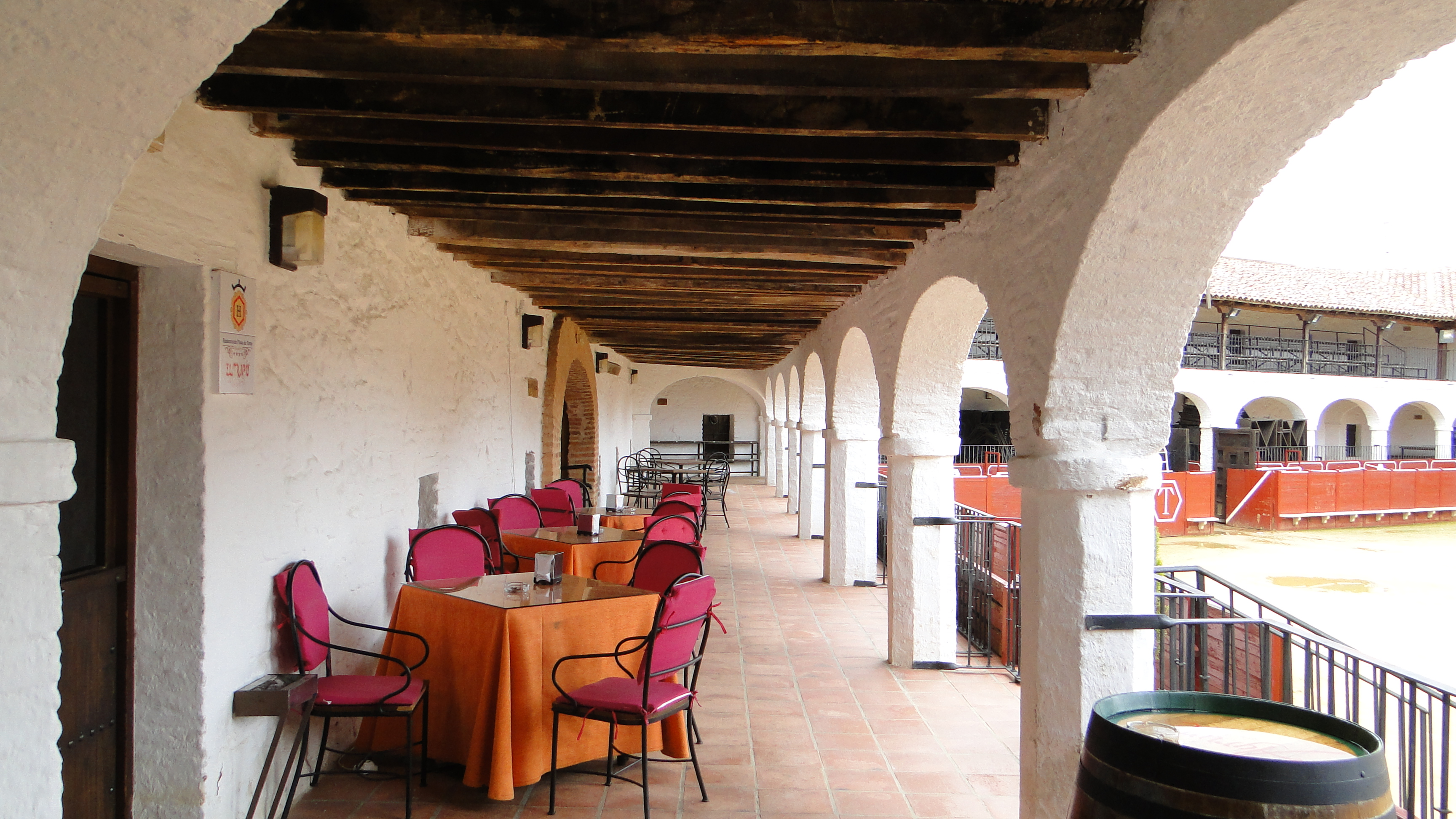 Almadén (Ciudad Real). Plaza de toros. Patrimonio de la Humanidad.